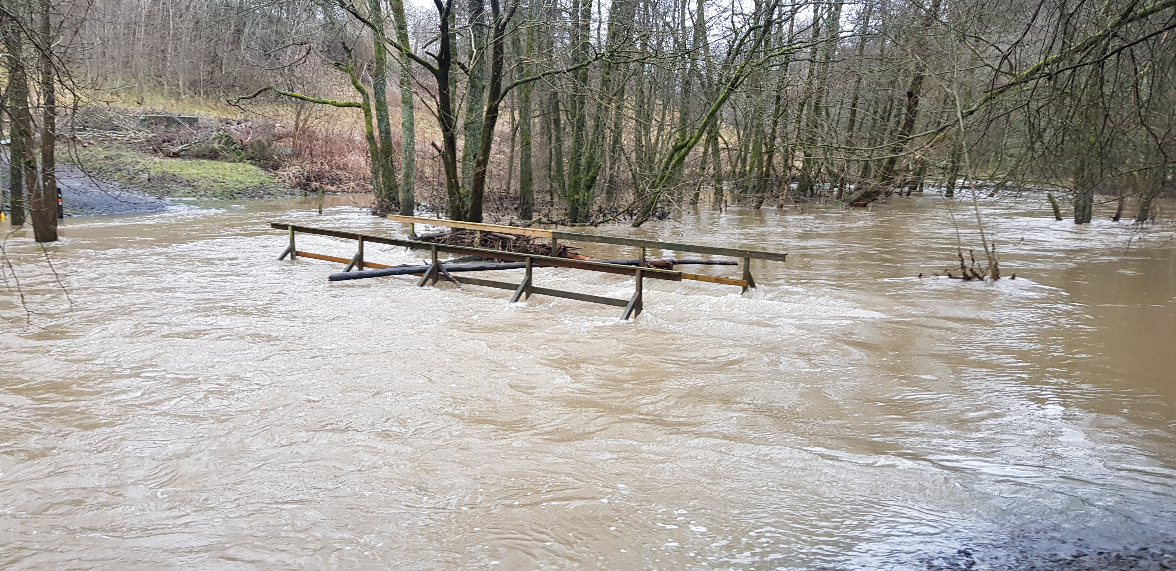 Högvatten i Lärjeån, efter snösmältningen i början av februari 2019